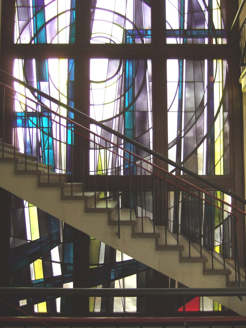 Bleiverglastes Fenster in der Gesamtschule Bonn-Bad Godesberg